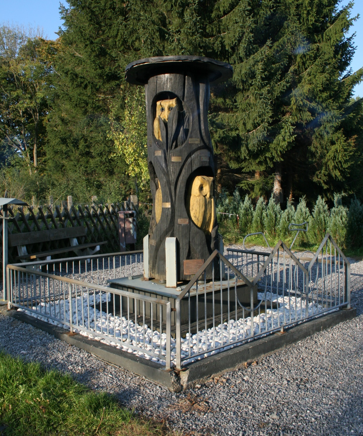 Ehrenmal für Radsportler auf dem Berg Eule in Fröndenberg. Aufschrift Tafel: „Gewidmet den Radsportlern aller Nationen von Willi Kemper, eingeweiht durch Gustav Kilian am 19. August 1989“.